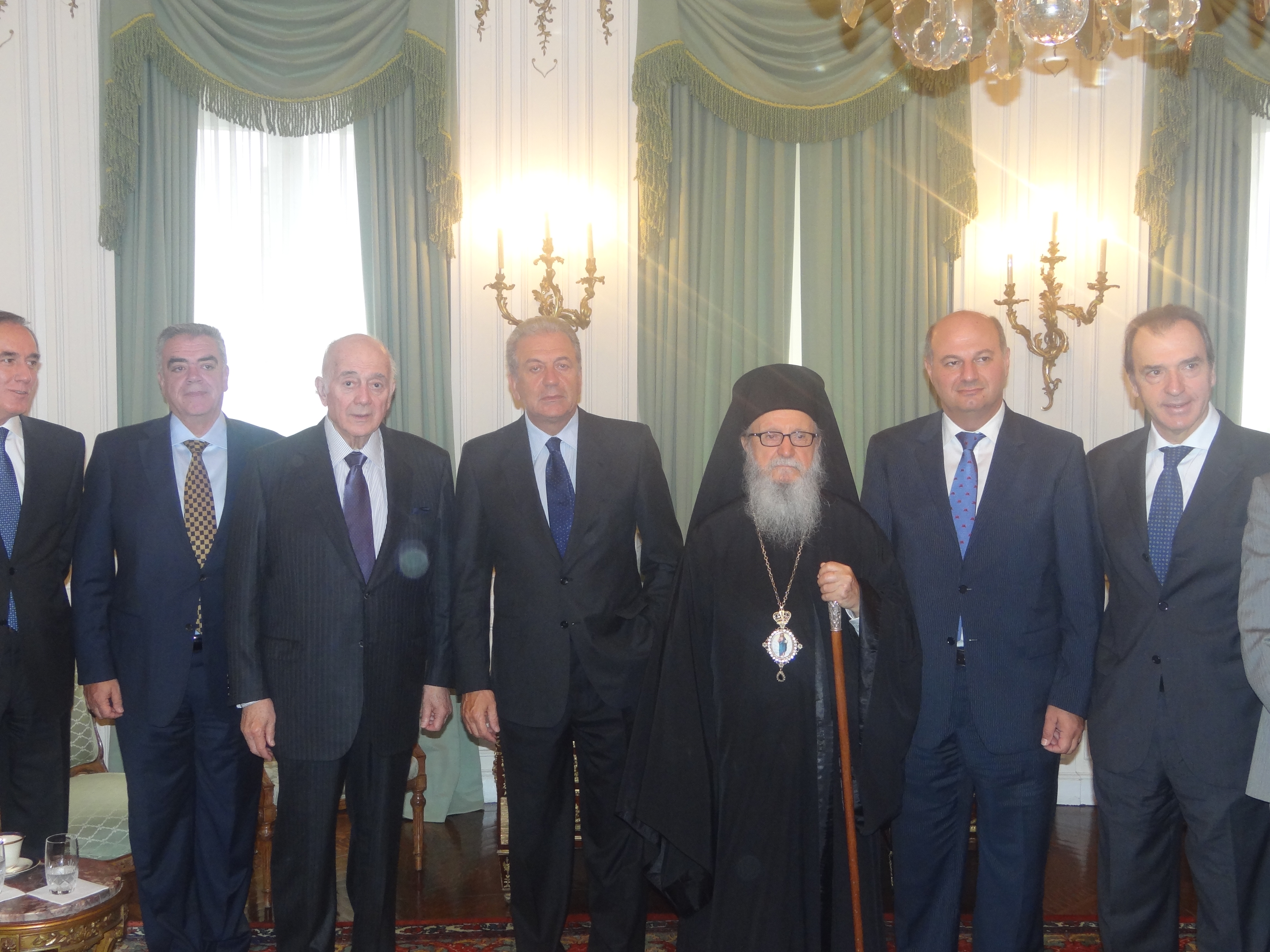 Συνάντηση ΥΠΕΞ Δ. Αβραμόπουλου με Αρχιεπίσκοπο Αμερικής Δημήτριο